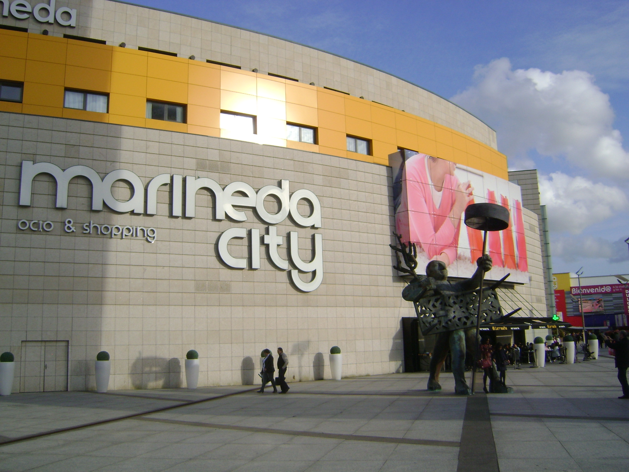 Centro Comercial Marineda City, La Coruña (España)